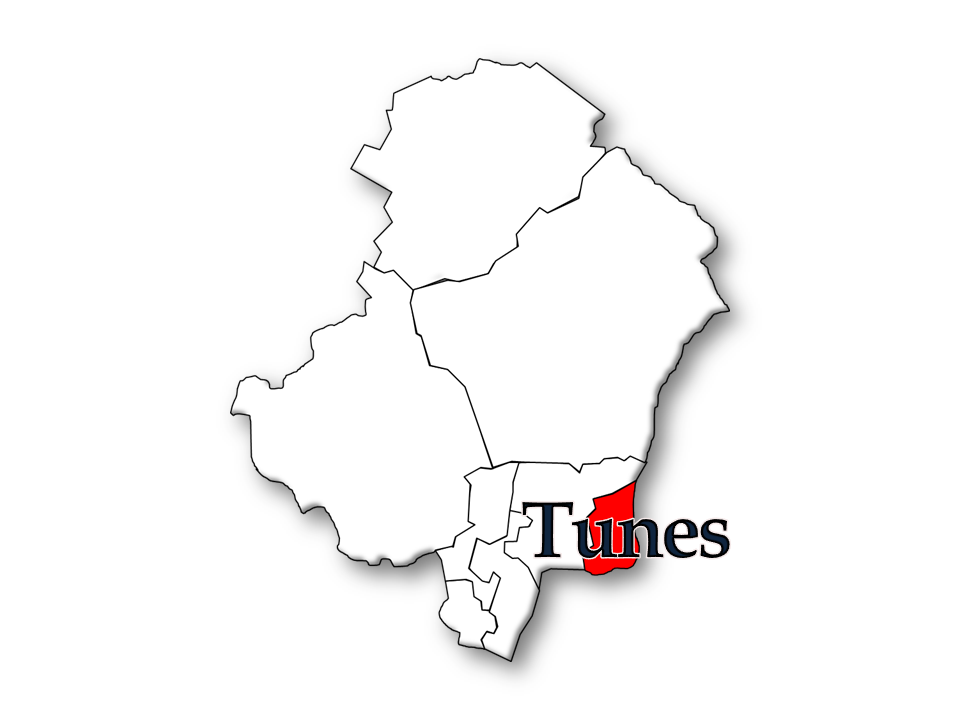 Censos 1864/2011